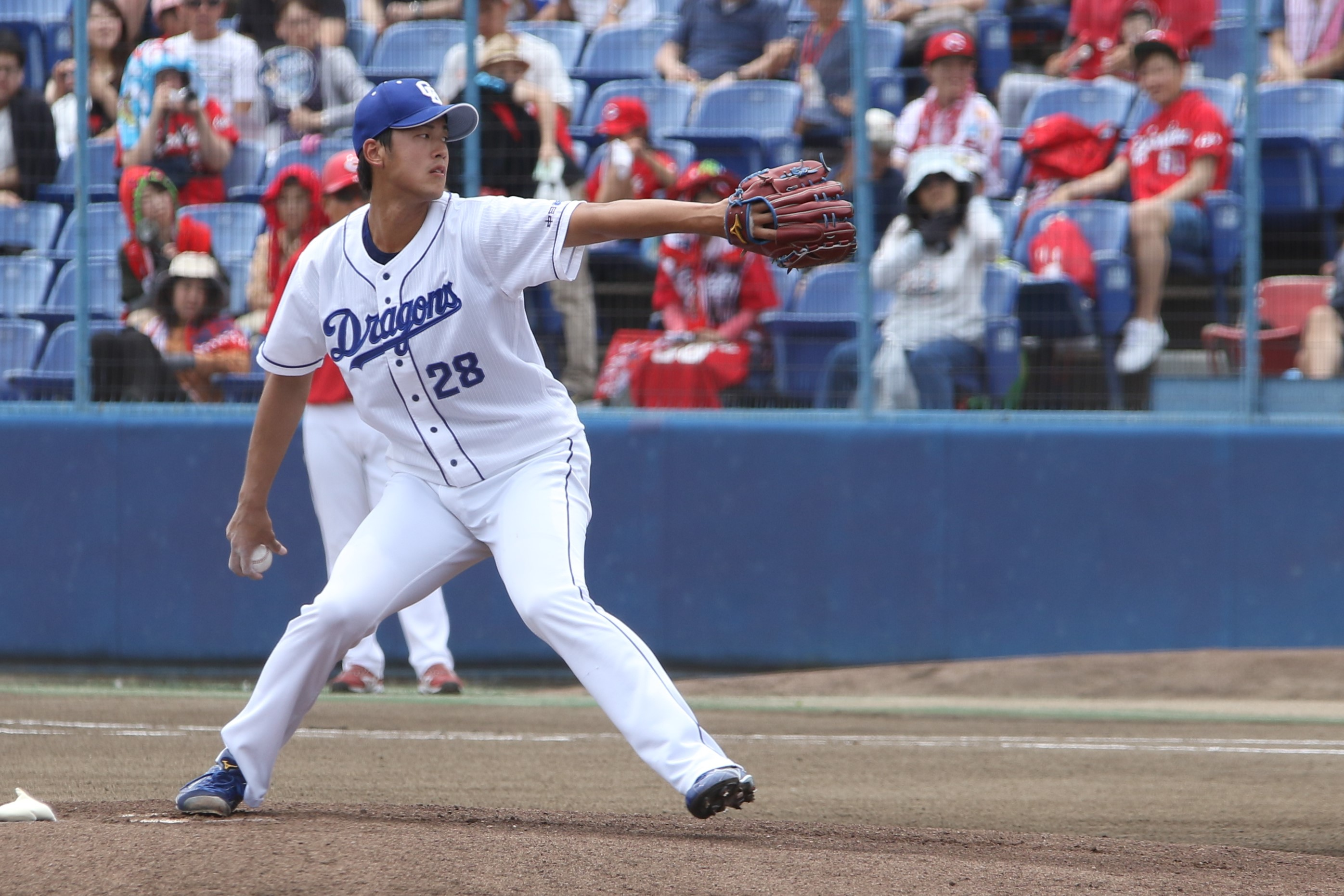 2019年6月23日、ナゴヤ球場にて